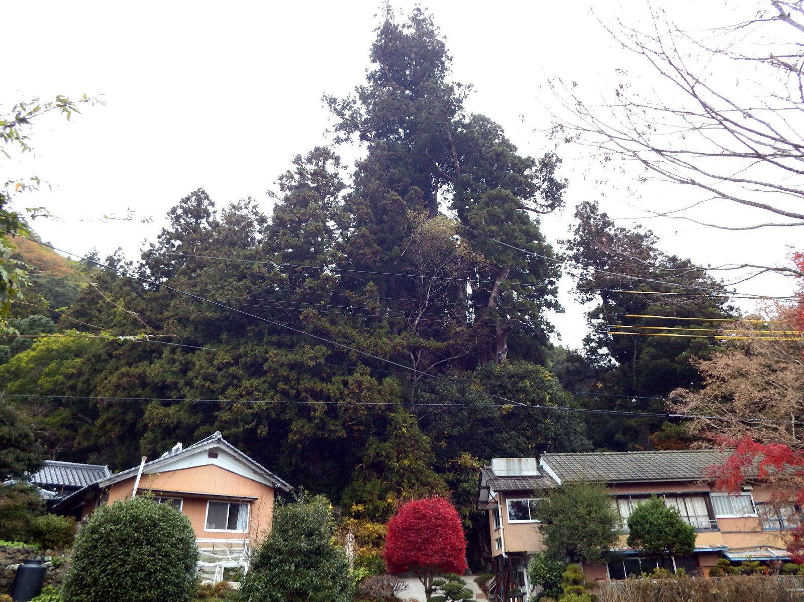 大杉を外から